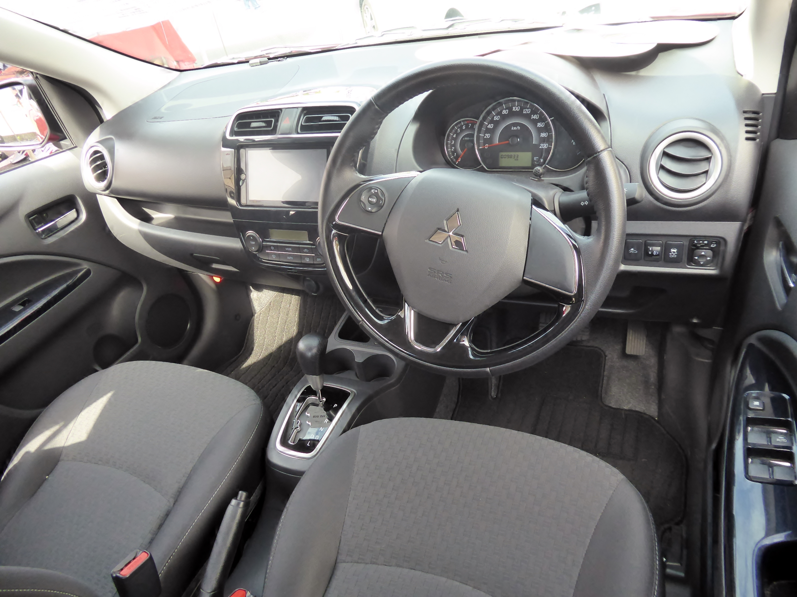 DBA-A03A-XTHX型三菱・ミラージュGのインテリアを撮影。